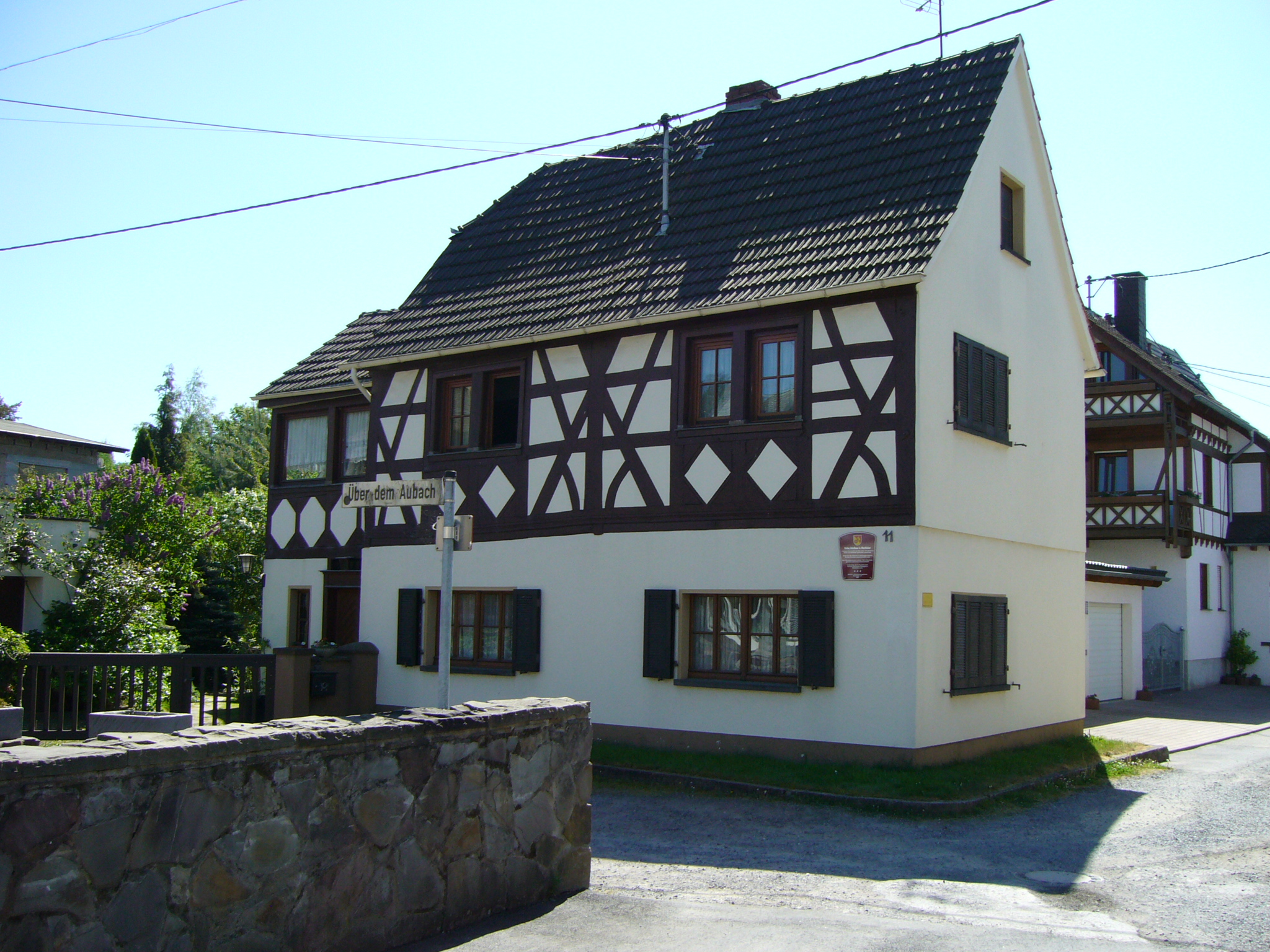 Erste Schule in Oberbieber